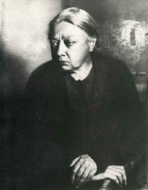 Надежда Константиновна Крупская, супруга В. И. Ленина